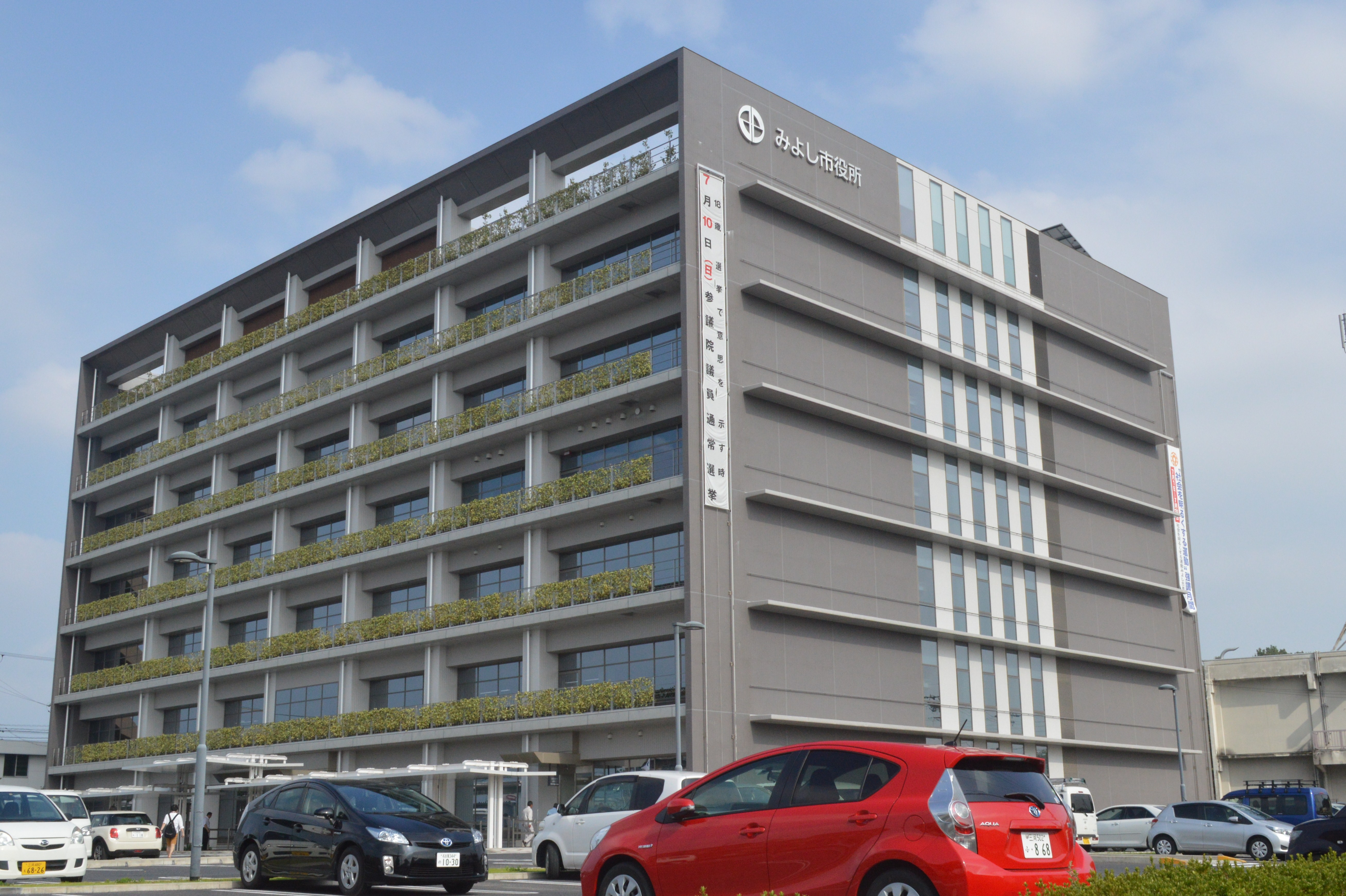 愛知県みよし市役所